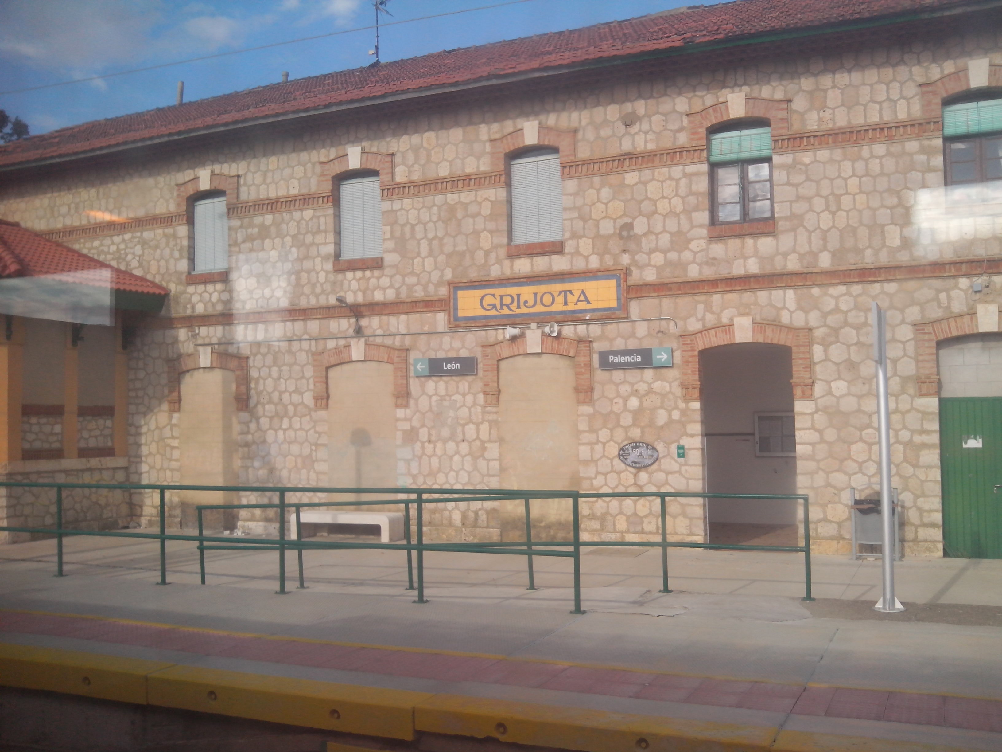 Estación de tren de Grijota (provincia de Palencia, España) en octubre de 2015.